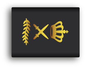 Rangen van de Nederlandse politie, epauletten (schuifpassanten) t.b.v. het huidige en het nieuwe (na 2014) uniform.